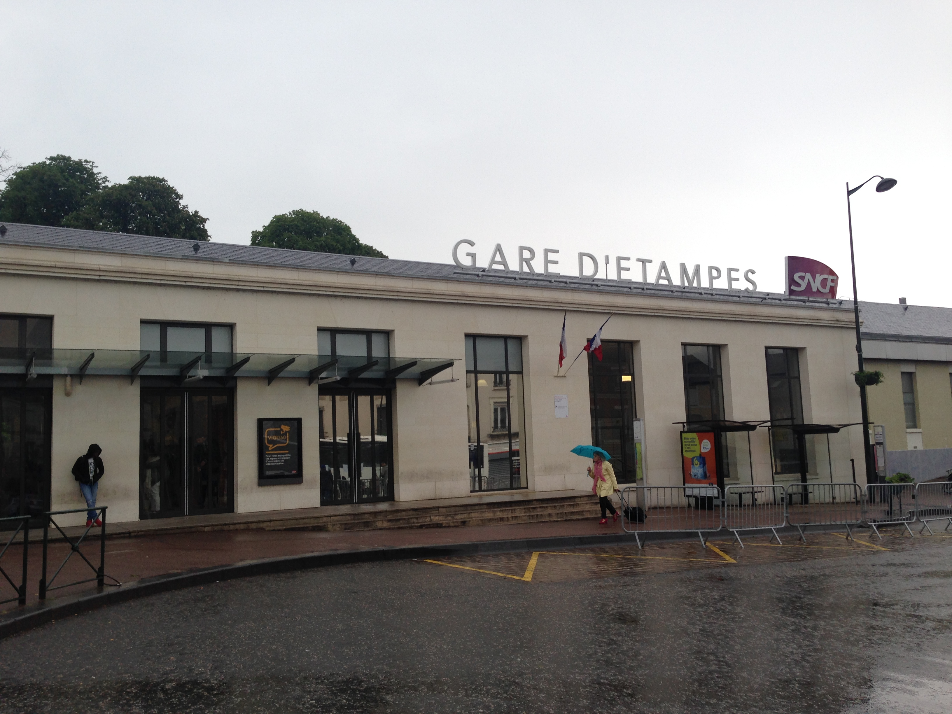 Gare d'Étampes